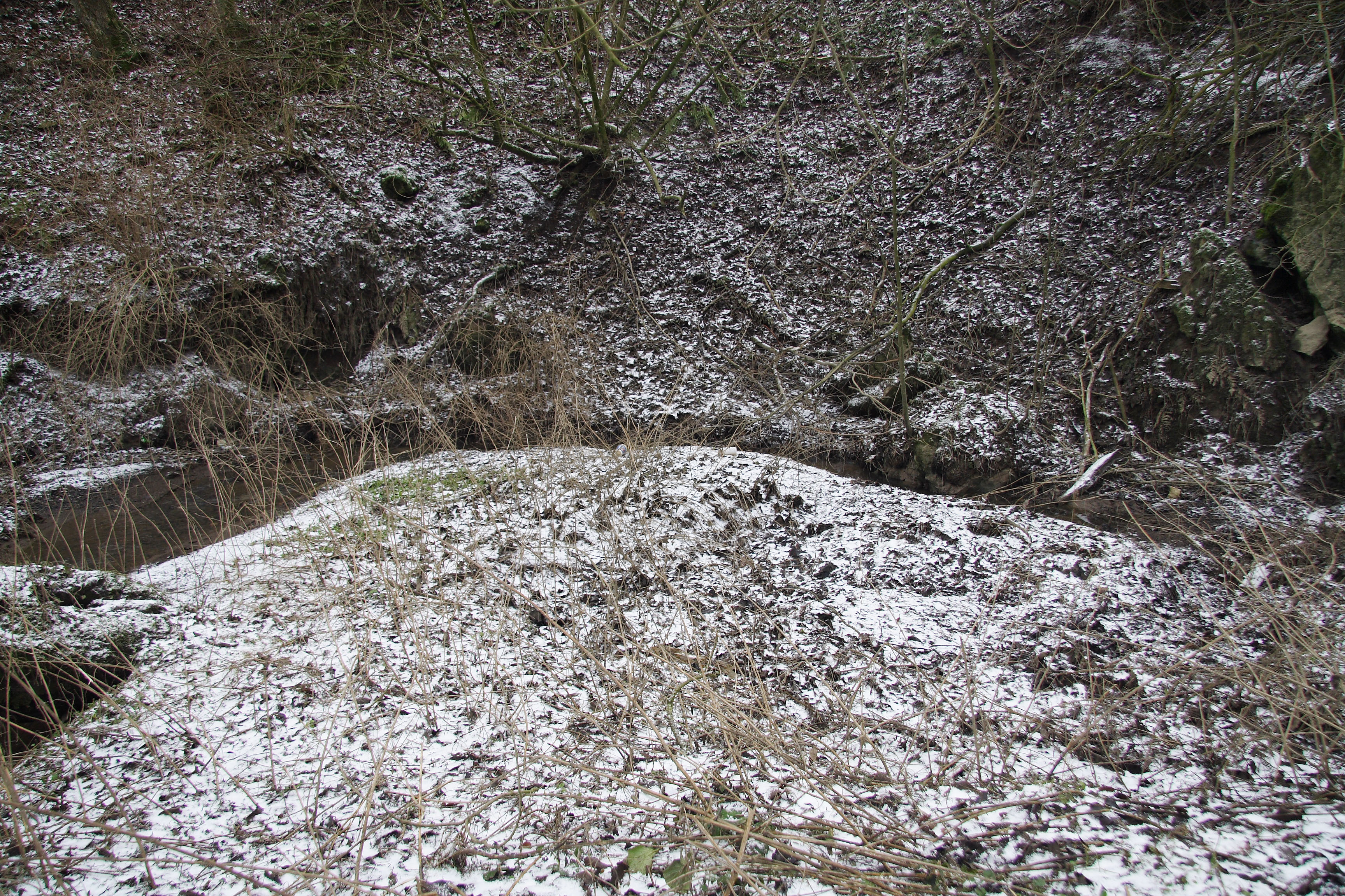 Die Untreue an ihrer Versickerungsstelle